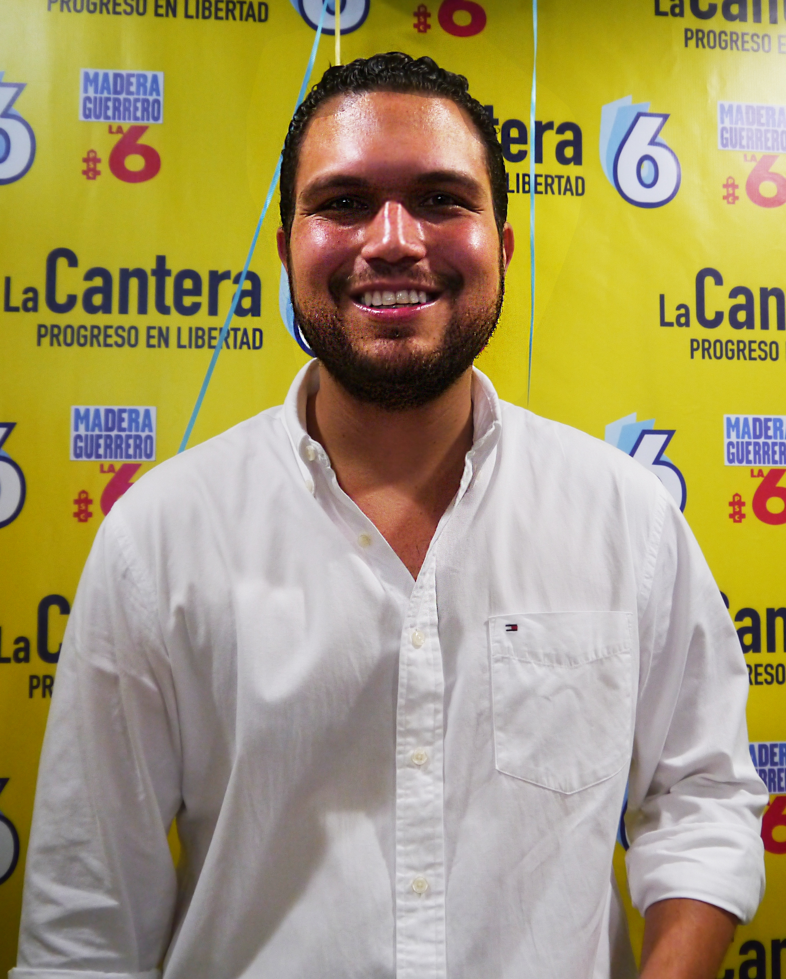 Josué Sánchez en evento de lanzamiento de La Cantera de la 6 en Guayaquil.